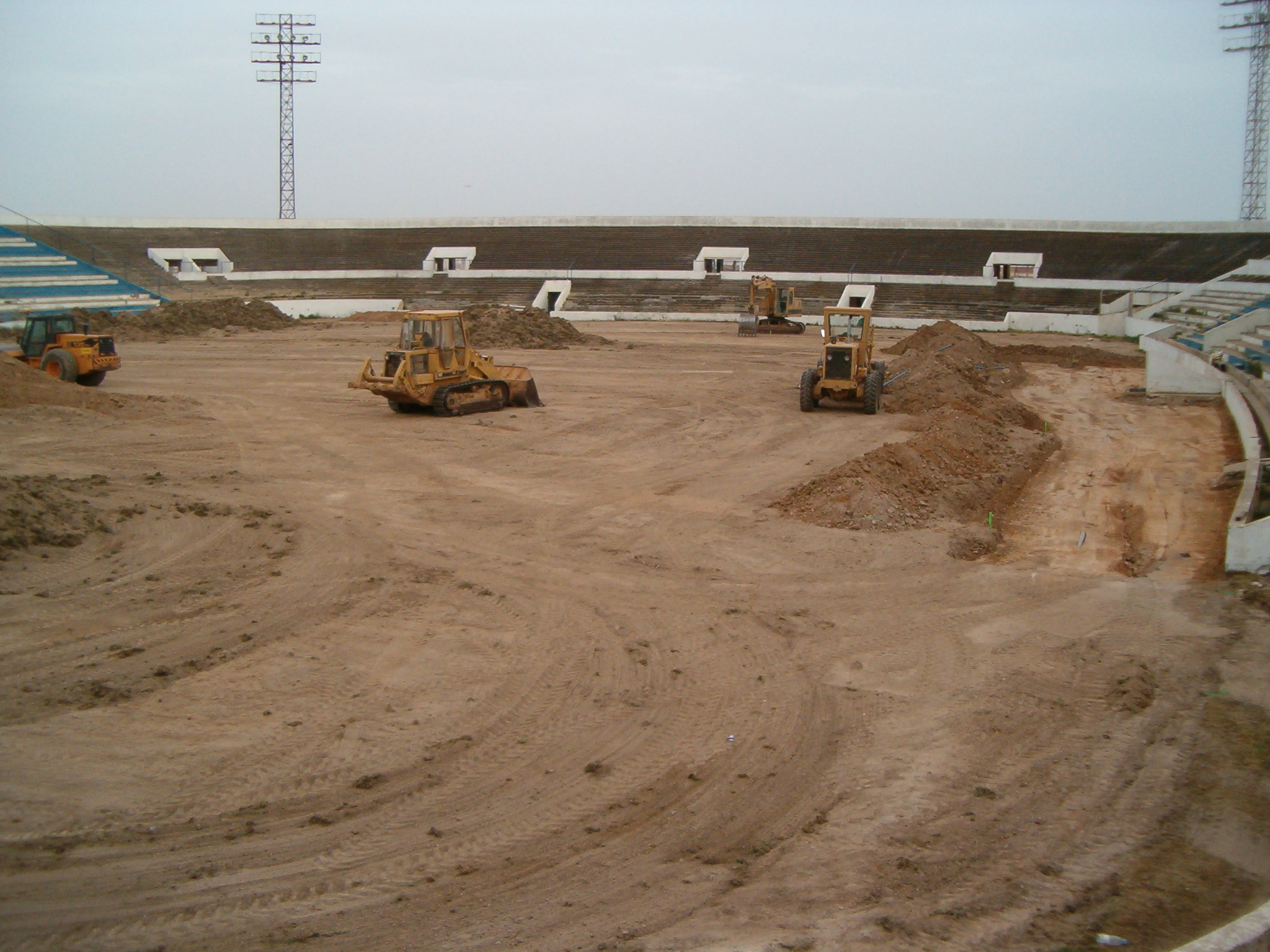 Obres de reforma de l'Estadi Balear.